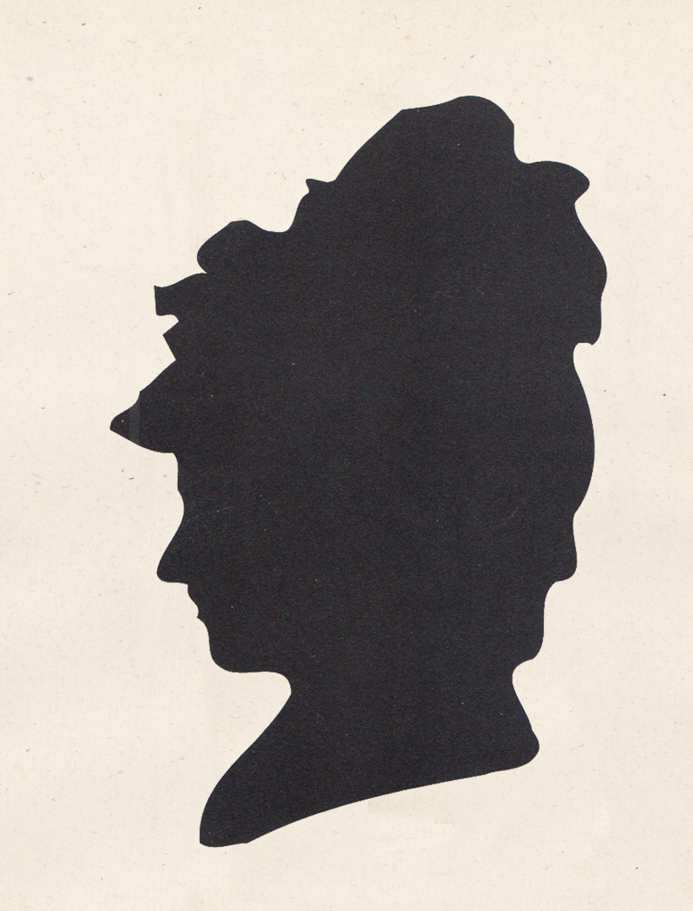 Abbildung zu Albertine von Grün